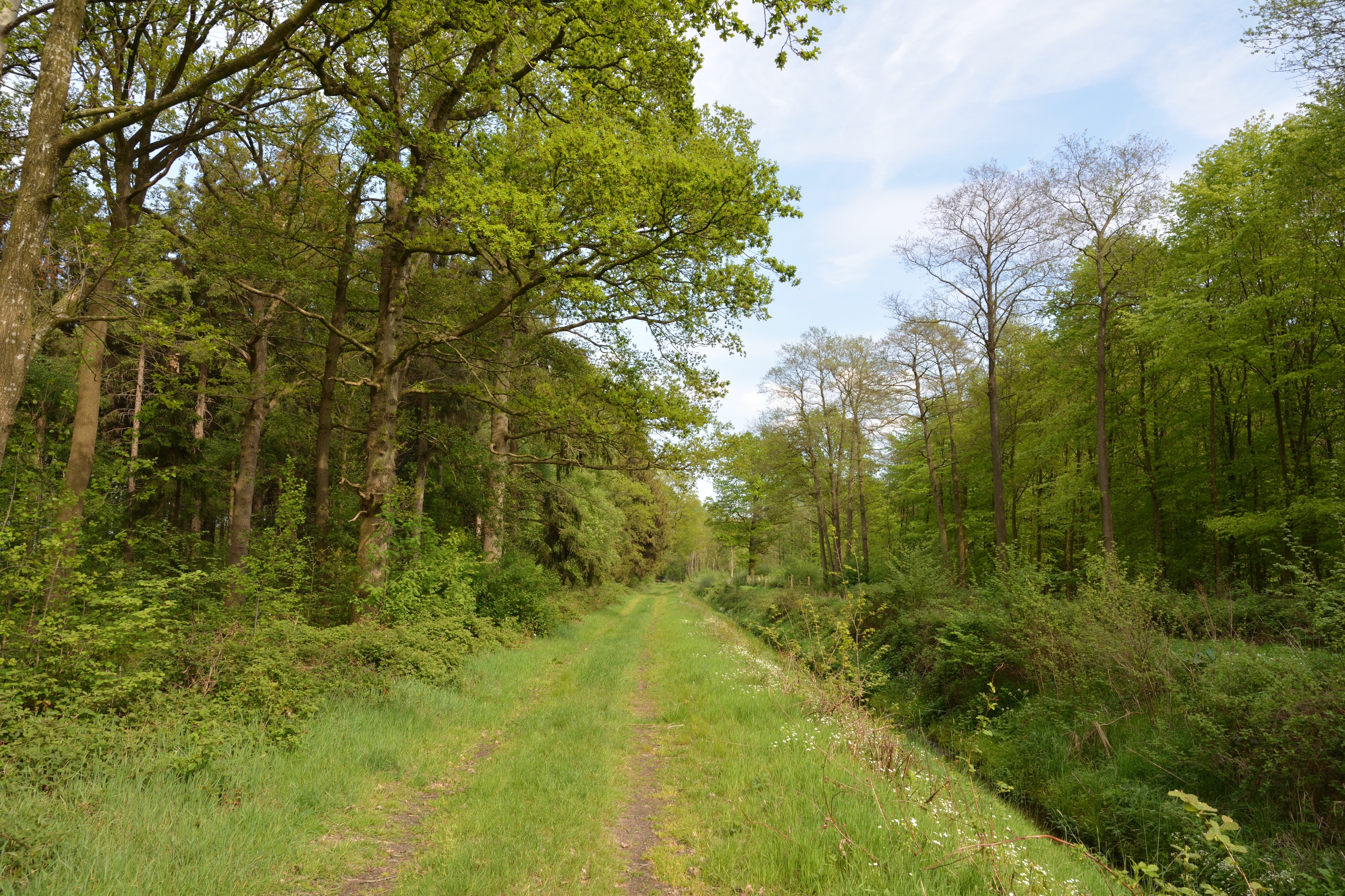 Der Kreis Steinburg hat mehrere Flächen unter dem gemeinsamen Namen "Landschaftsbestandteile und Landschaftsteile im Bereich mehrerer Gemeinden" zusammengefasst. Dieses Foto wurde in der „Waldfläche Wulfshorst“ aufgenommen, es ist das Teilstück Nr. 18 .